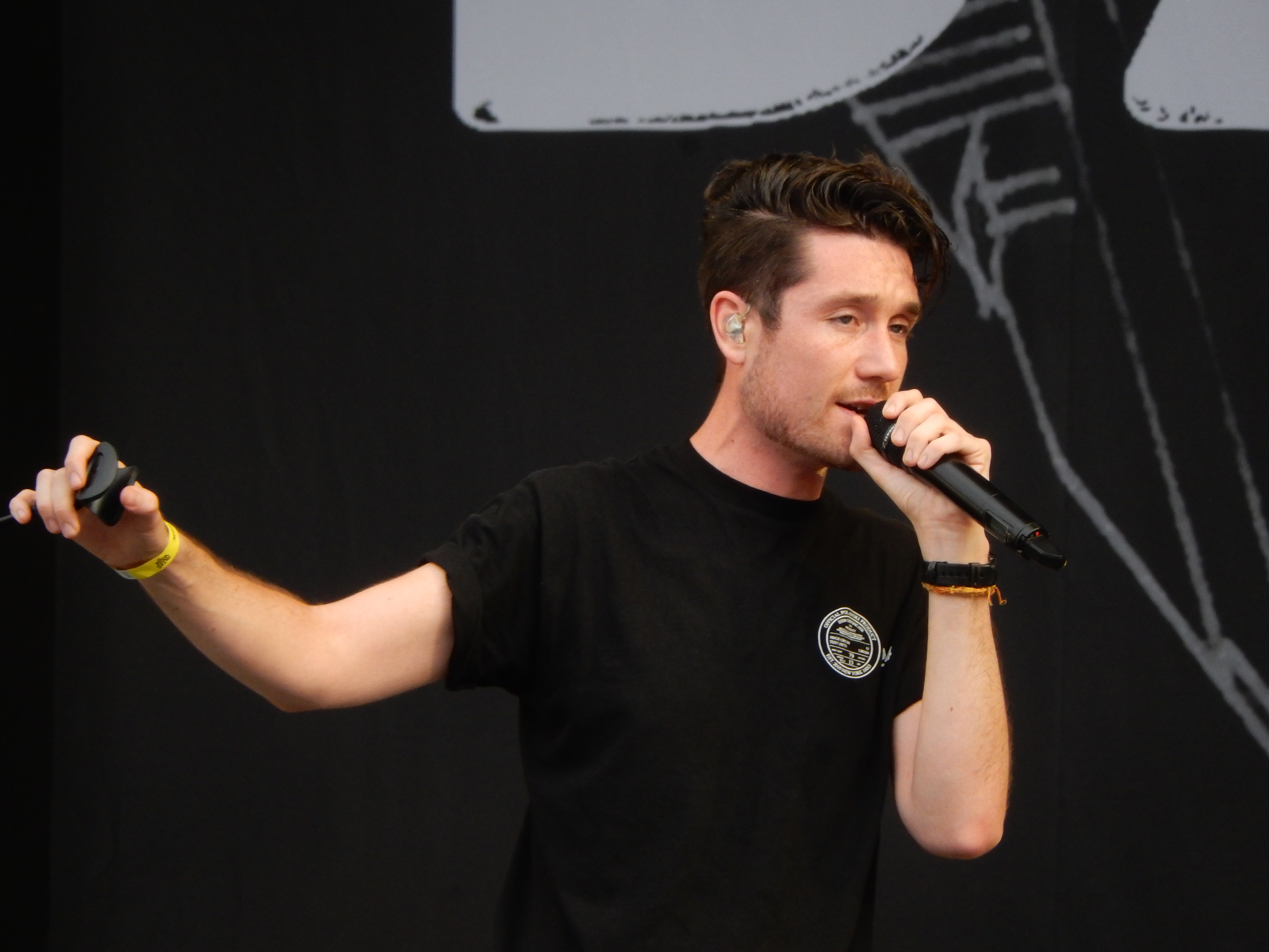 Bastille, Rock en Seine 2016, Paris